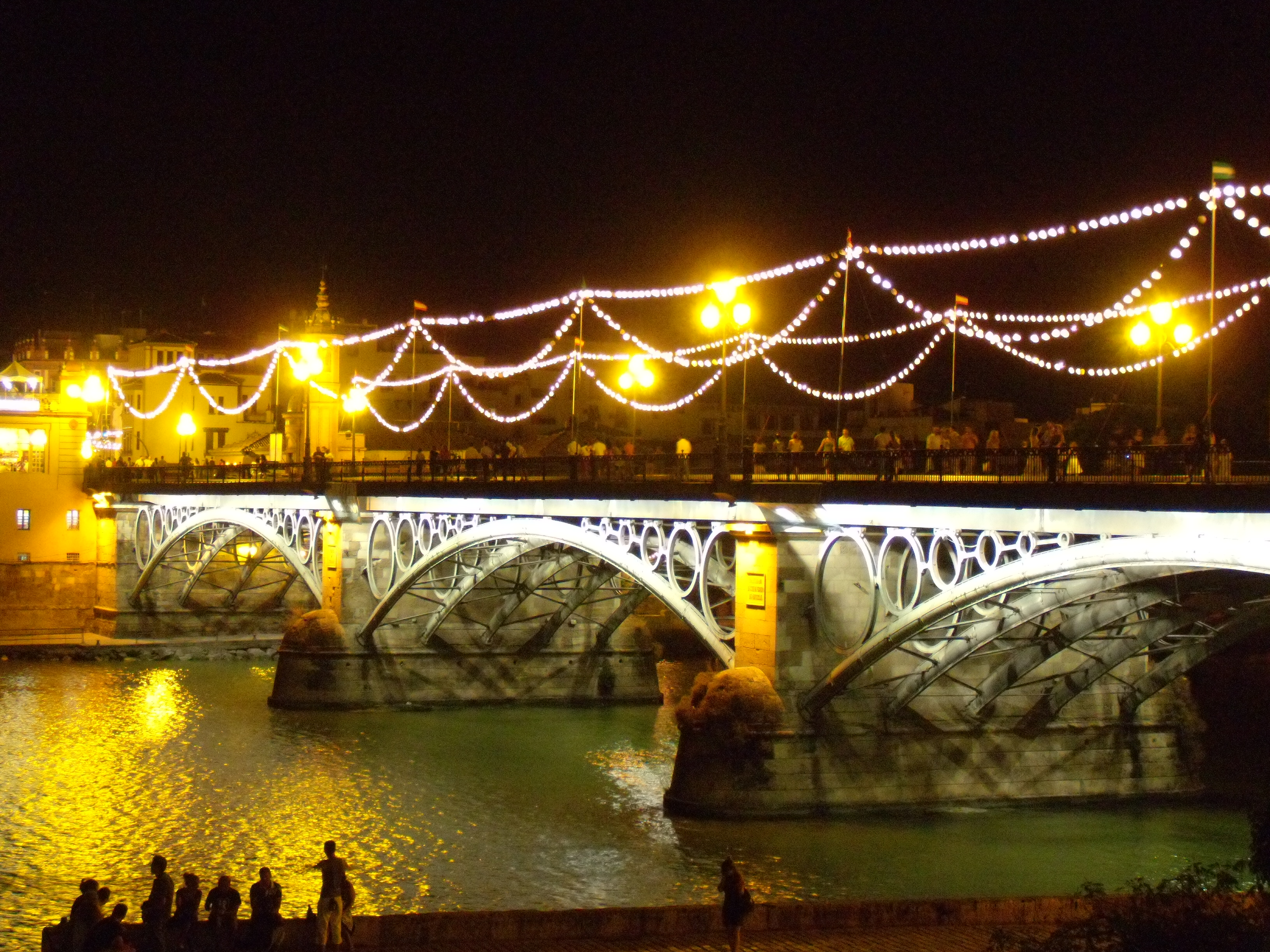 El puente de Triana (Sevilla, España) durante la velá de Santa Ana 2008